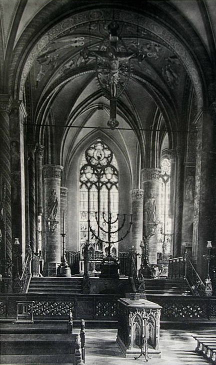 Tafel 2 von Georg Humanns „Die Kunstwerke der Münsterkirche zu Essen“: Ostchor der Münsterkirche (1904)